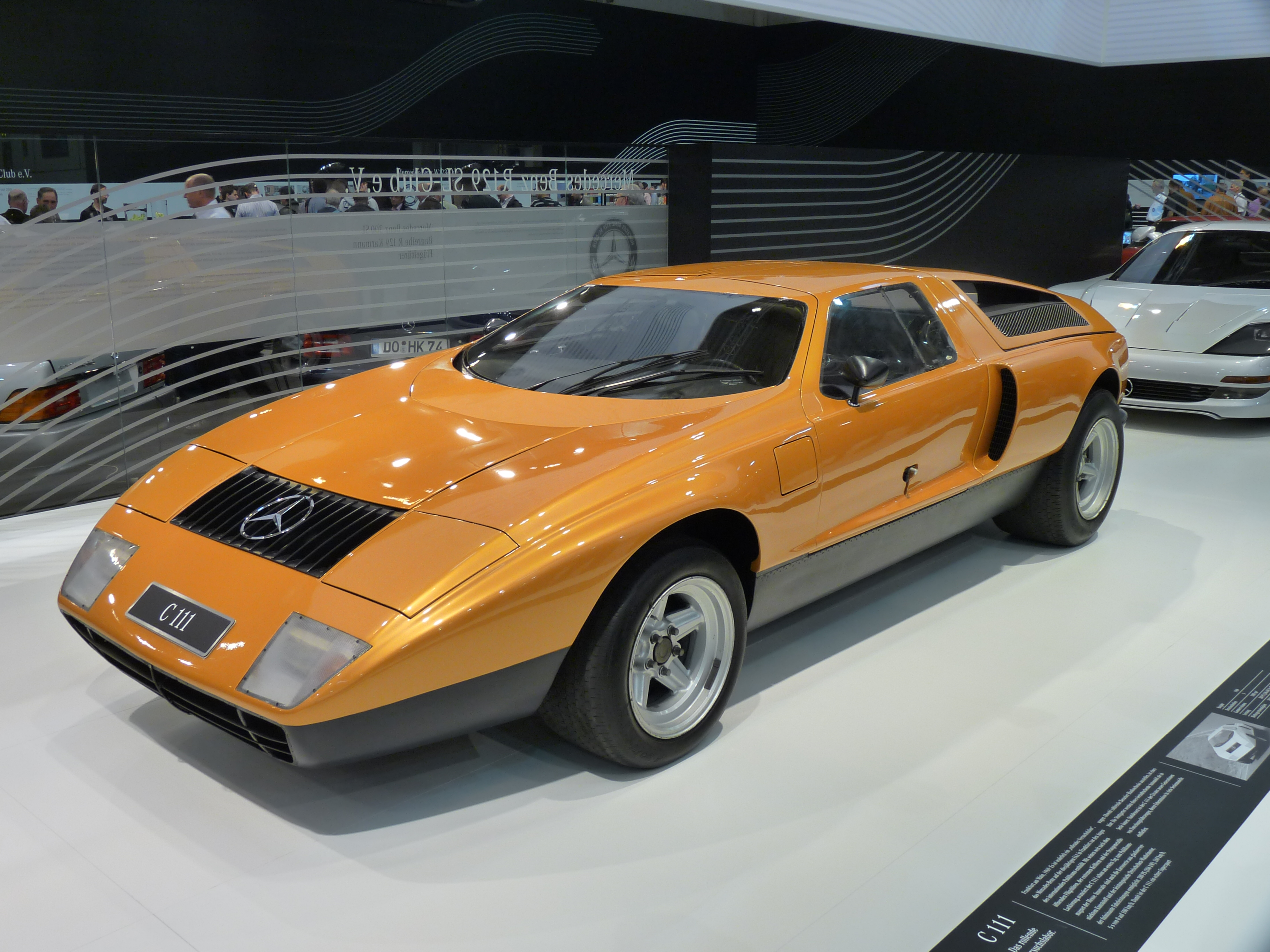 description see filename